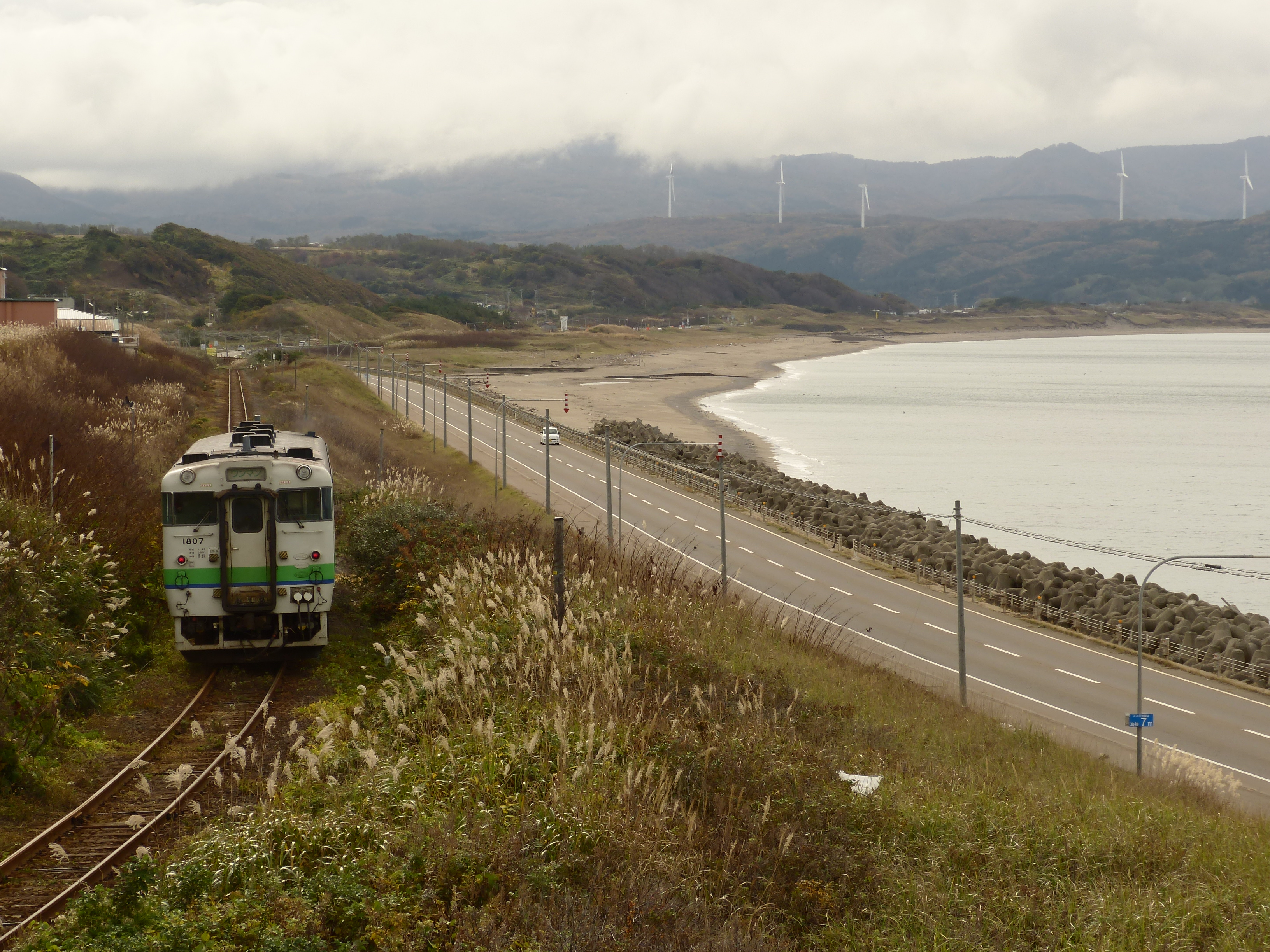 JR北海道江差線を、日本海を望みながら走るキハ40系気動車。江差‐上ノ国の駅間にて撮影。隣を併走する道路は国道228号線。